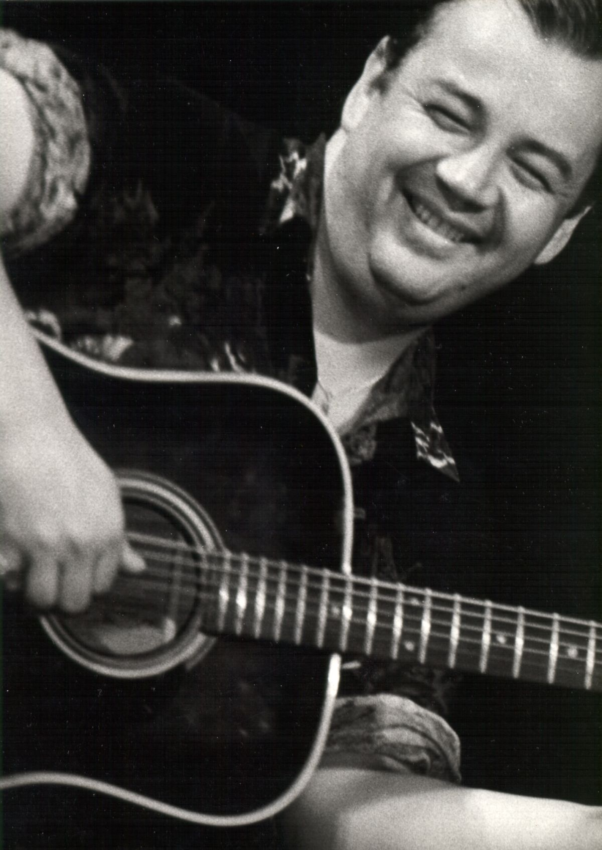 Stanisław Soyka w latach osiemdziesiątych